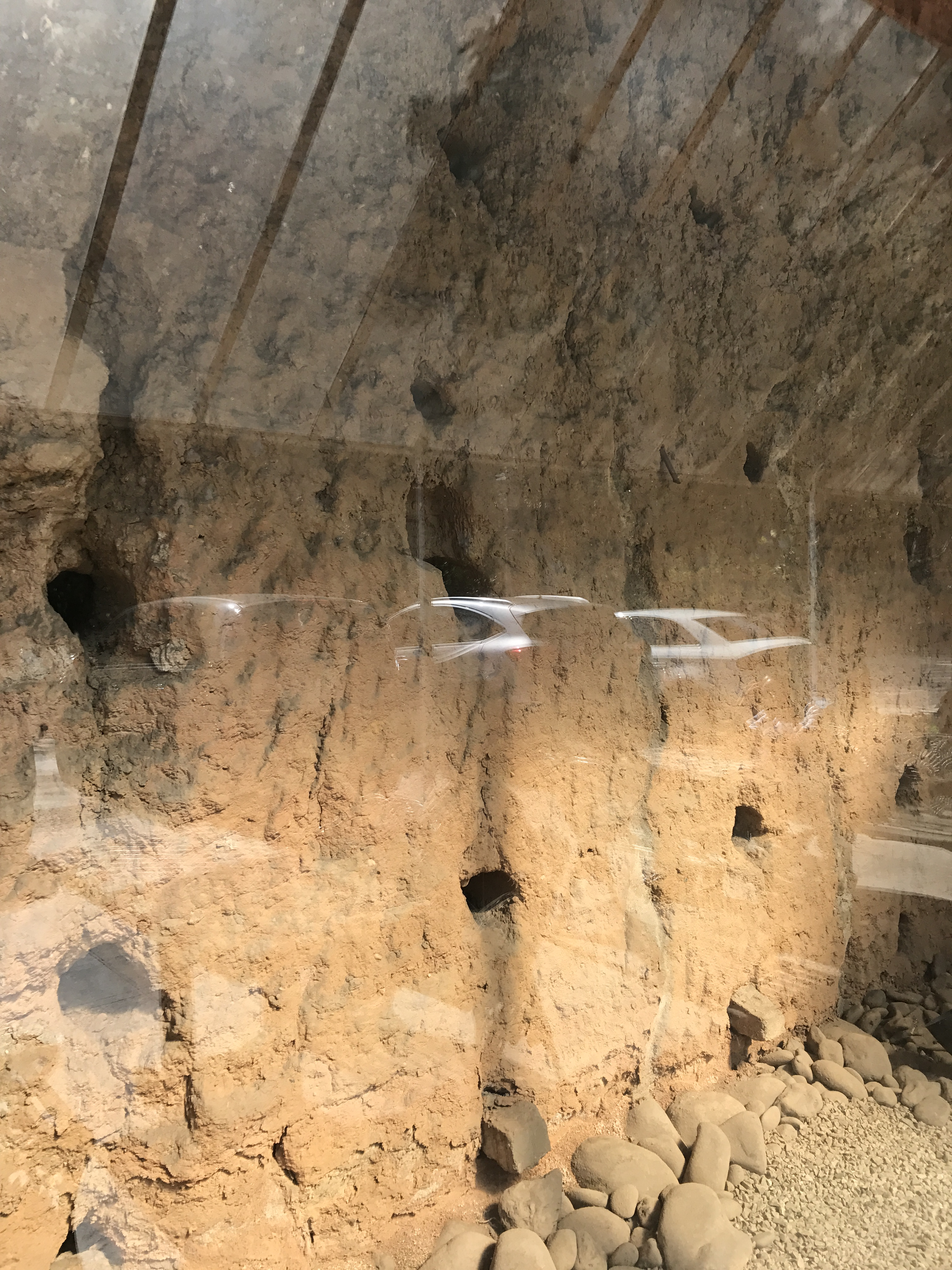 Parte da primeira parede de São Paulo, feita de taipa de pilão, guardada em sala com paredes de vidro para sua preservação.